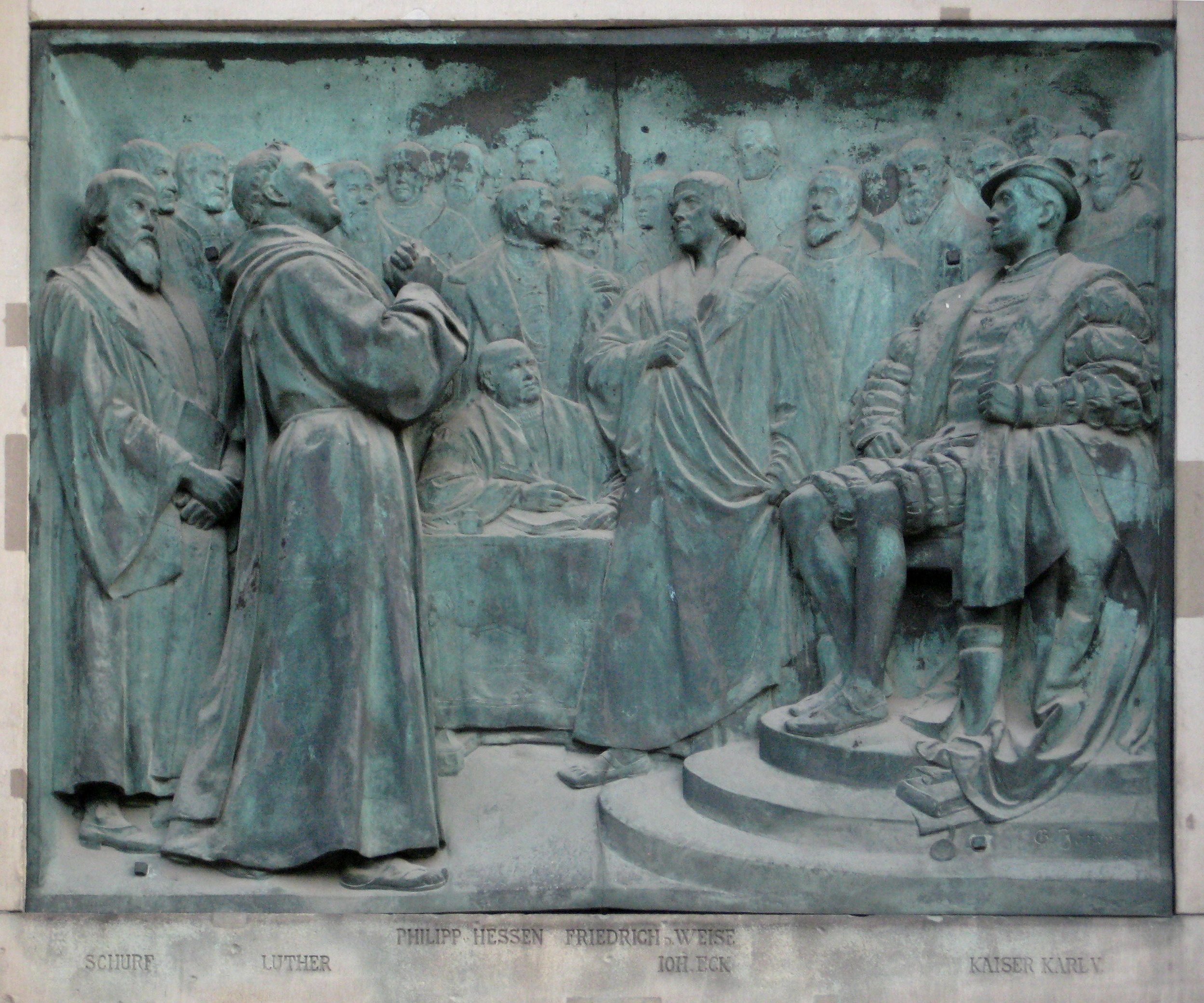 Berliner Dom (Hauptportal links), Relief "Martin Luther vor dem Wormser Reichstag"